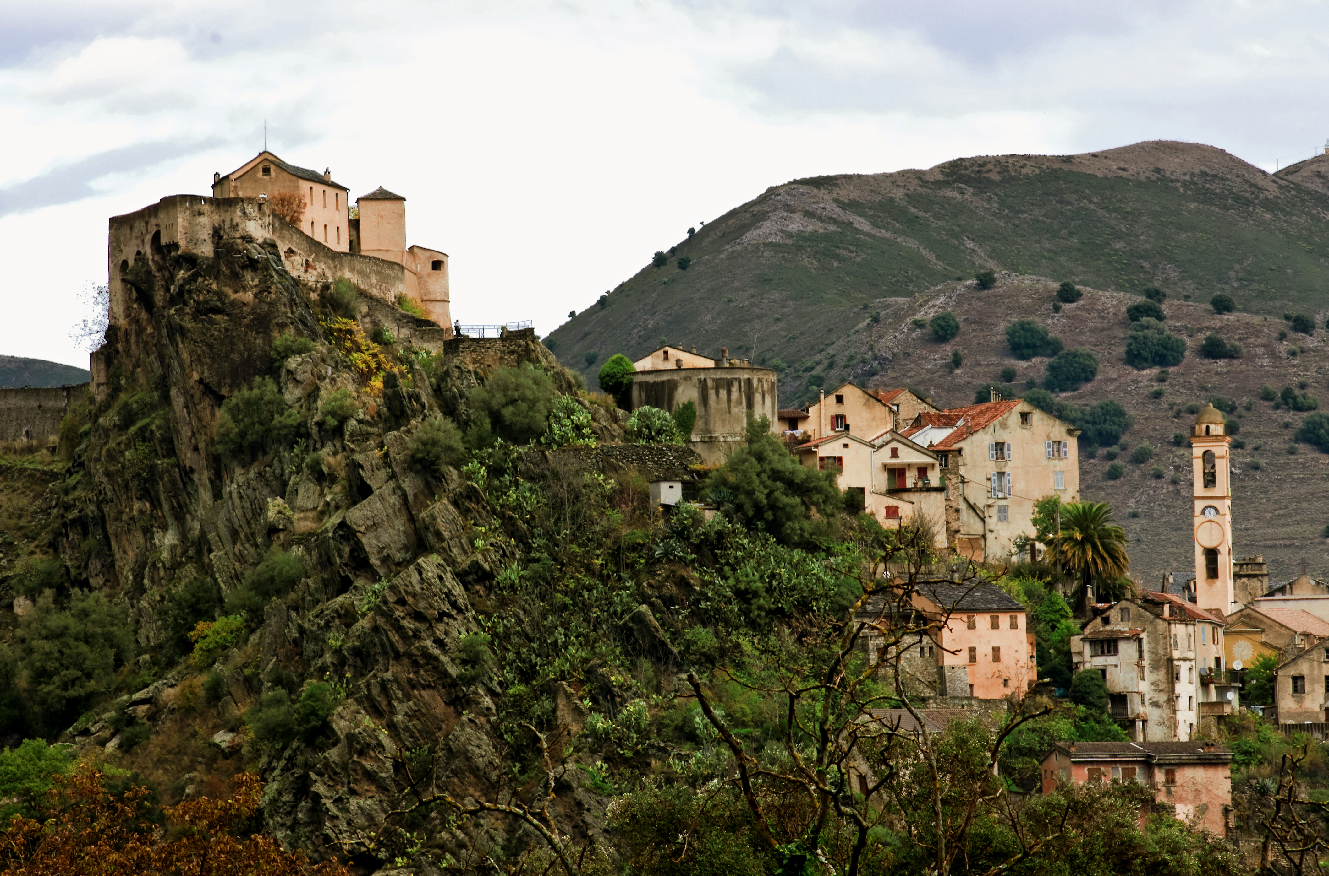 La citadelle de Corte construite en 1420 par Vincent Vincentello d'Istria, familièrement appelée "Nid d'aigle" par les gens de la région. ...